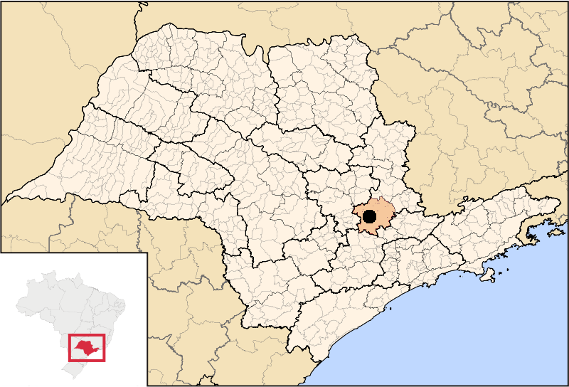 Mapa de localização do Município de Campinas no Estado de São Paulo, Brasil.